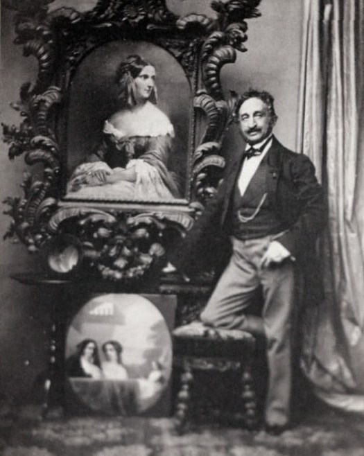 Лазарь Екимович Лазарев (1797—1871) в окружении портрета своей жены А. П. Бирон и группового портрета своих дочерей: Дарьи, Анны и Леониллы. (1842–1932).